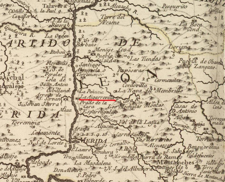 La Algarrovilla, actual La Garrovilla (Badajoz), en el mapa de la provincia de Estremadura (1766)